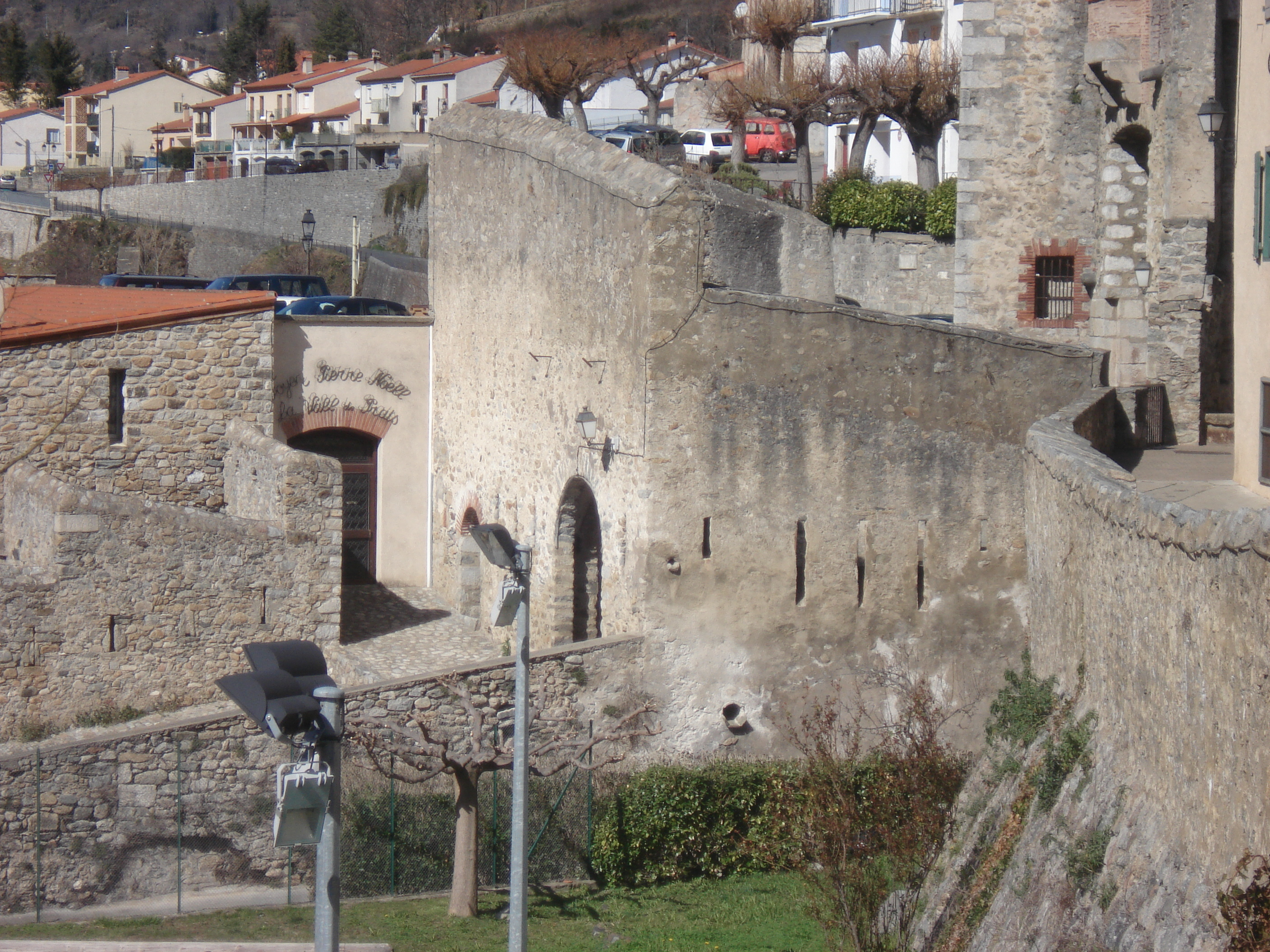 Porta d'Espanya de Prats de Molló.